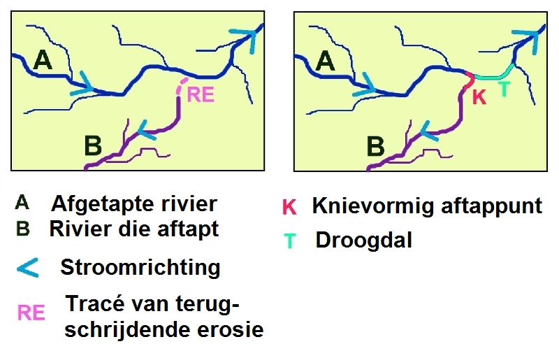 Diagram dat rivieronthoofding weergeeft